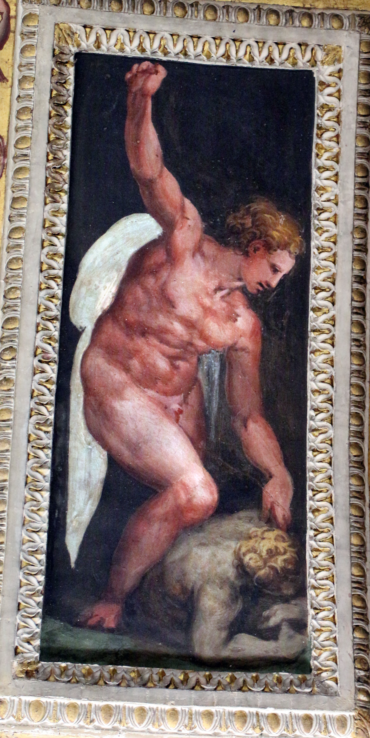 Allegoria del temperamento Sanguigno secondo la dottrina dei quattro umori, affresco di Jacopo Zucchi e del Poppi sul soffitto dello studiolo di Francesco I nel Palazzo Vecchio a Firenze